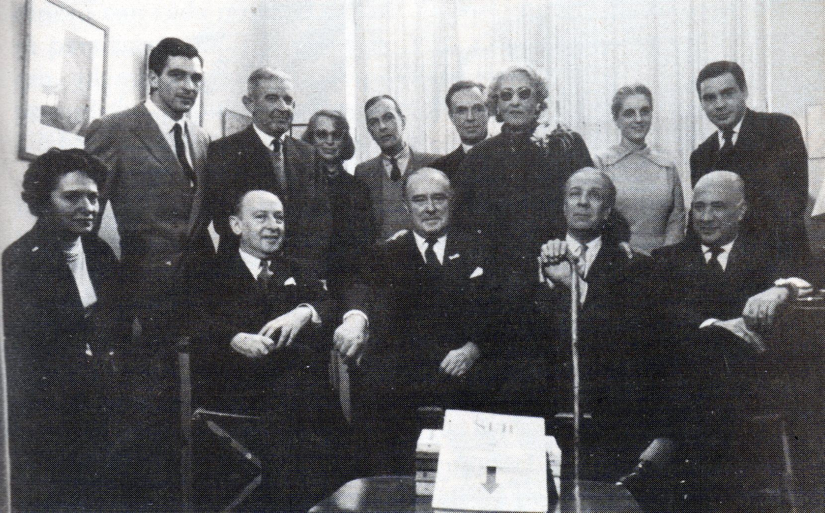 El equipo de la revista "Sur", desaparecida en los años 70, posa para una foto.